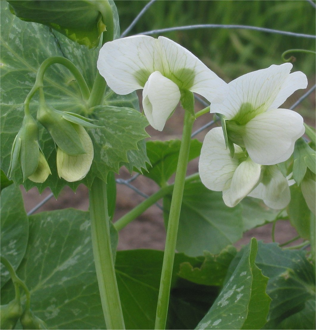 (Doperwt rijserwt bloemen)Pisum sativum